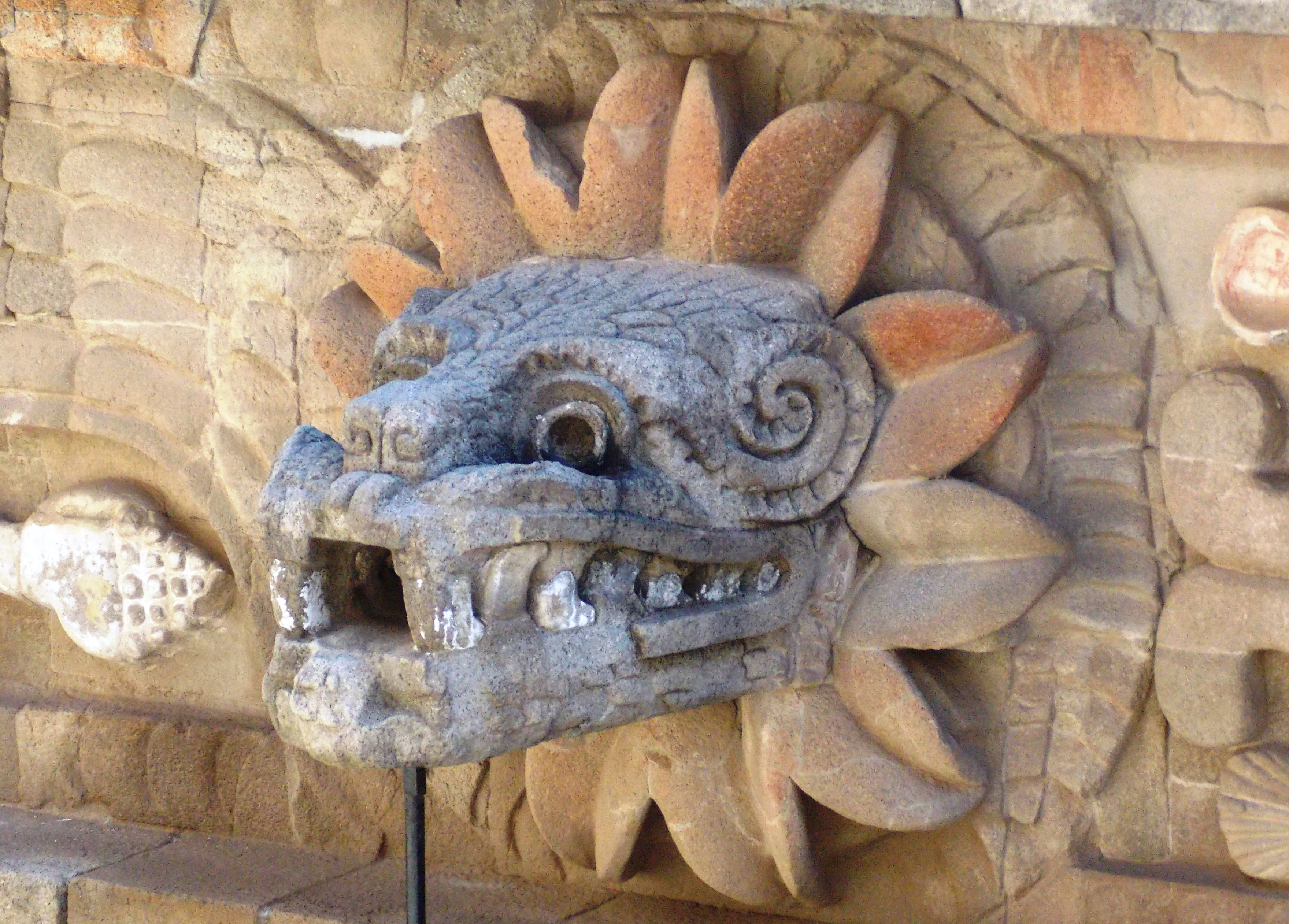 Entrada a las ruinas de Teotihuacan.